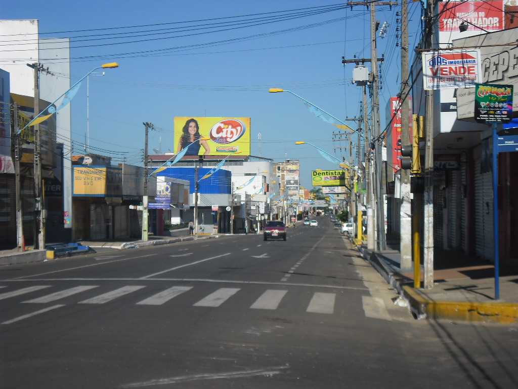 imperatriz ma